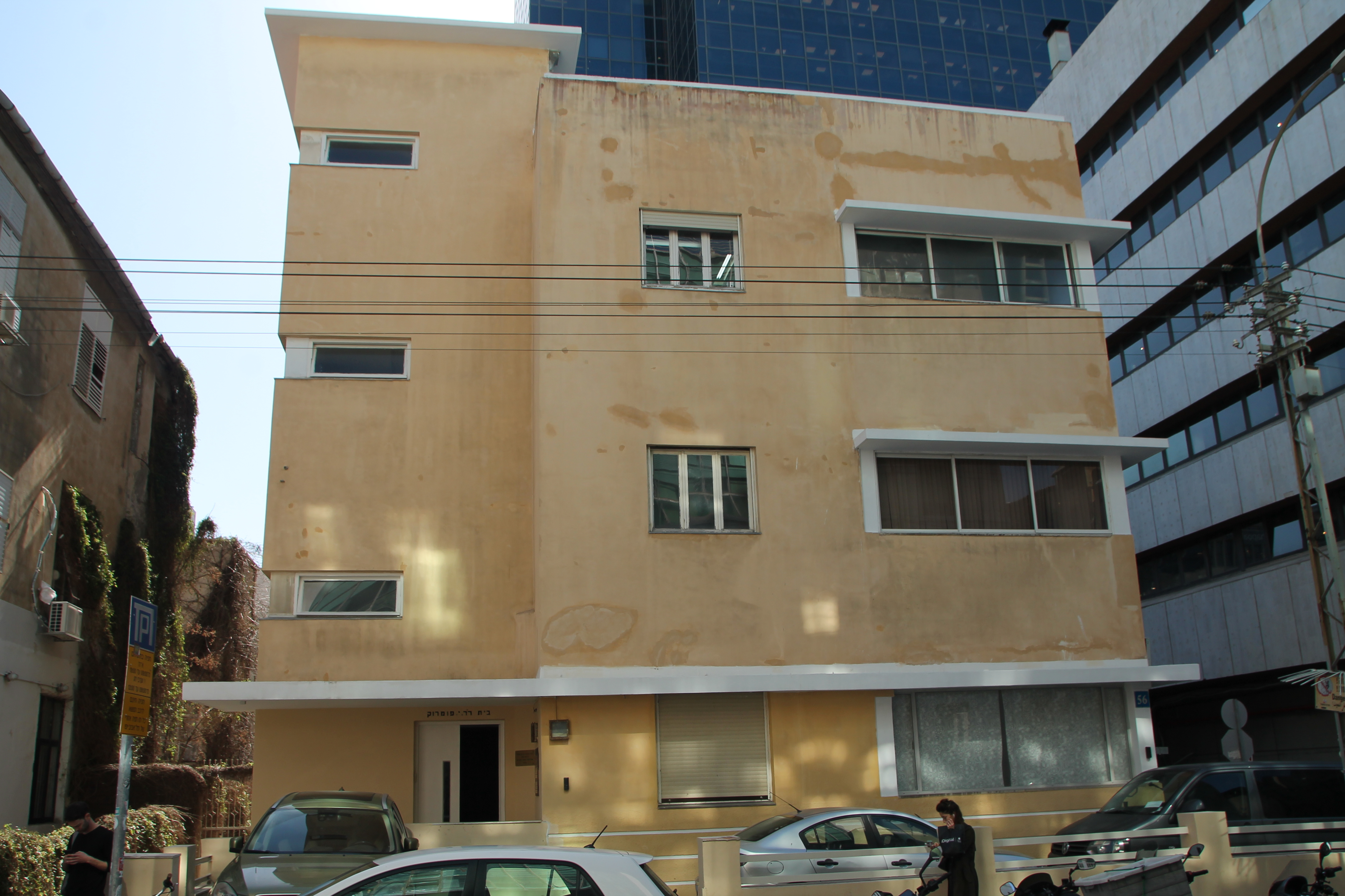 בית פומרוק ברחוב אחד העם מס' 56 בתל אביב